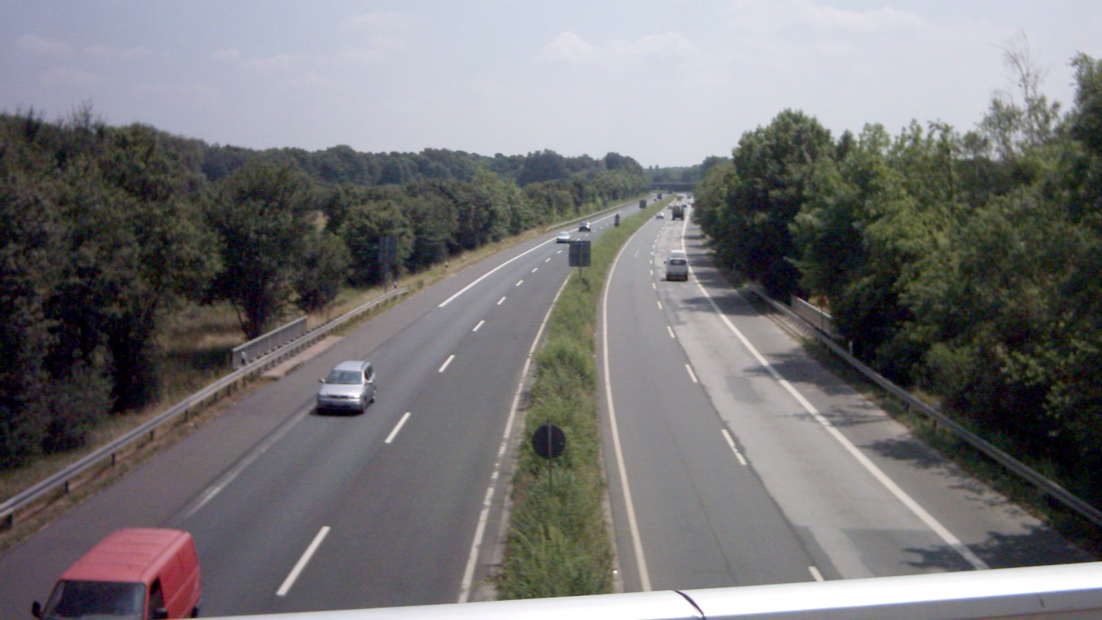 B 448 vom Bieberer Friedhof in Offenbach am Main in Richtung Obertshausen.